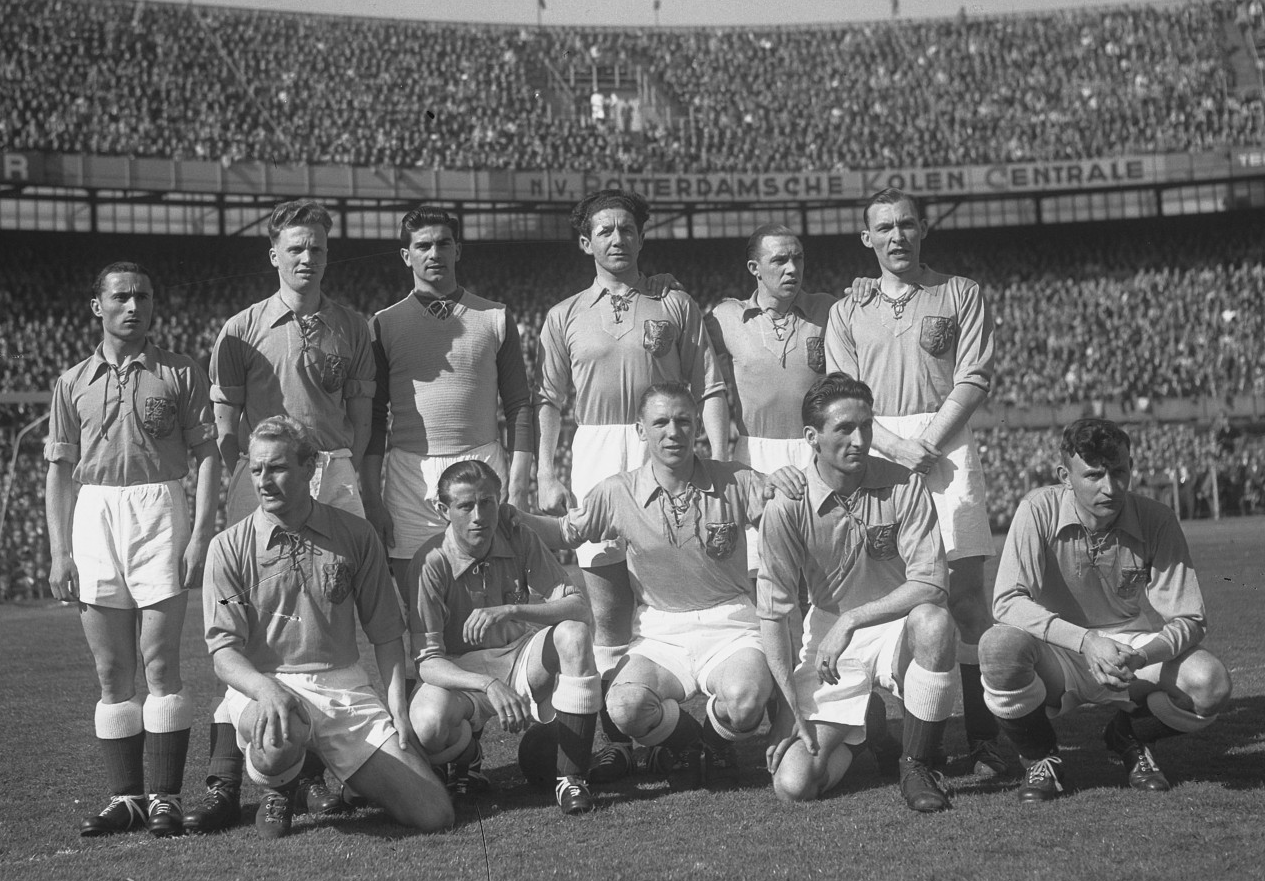 Nederland-Frankrijk 4-1. Nederlandse Elftal:staand vlnr: van Overbeek, van Schijndel, de Munck, Terlouw, de Vroet (captain), van Bun; zittend vlnr: Schijvenaar, Timmermans, Brandes, Wilkes, Lenstra.